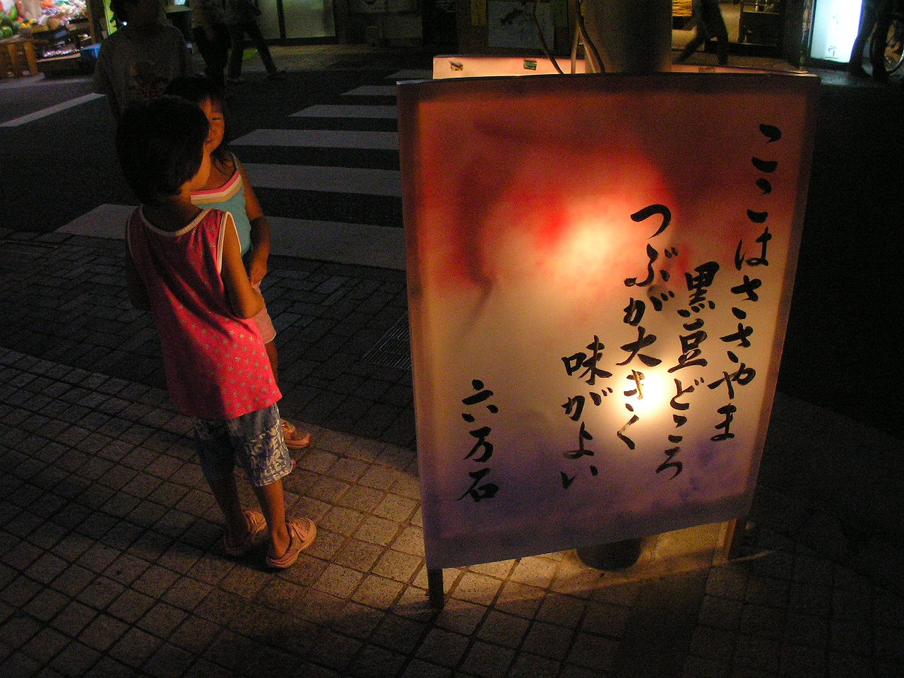 行灯、行燈（あんどん）は照明器具の一つ。持ち運ぶもの、室内に置くもの、壁に掛けるものなど様々な種類がある。もともとは持ち運ぶものだったため「行灯」の字が当てられ、これを唐音読みして「あんどん」となった。携行タイプは後に提灯に取って代わられた為、据付型が主流となった。